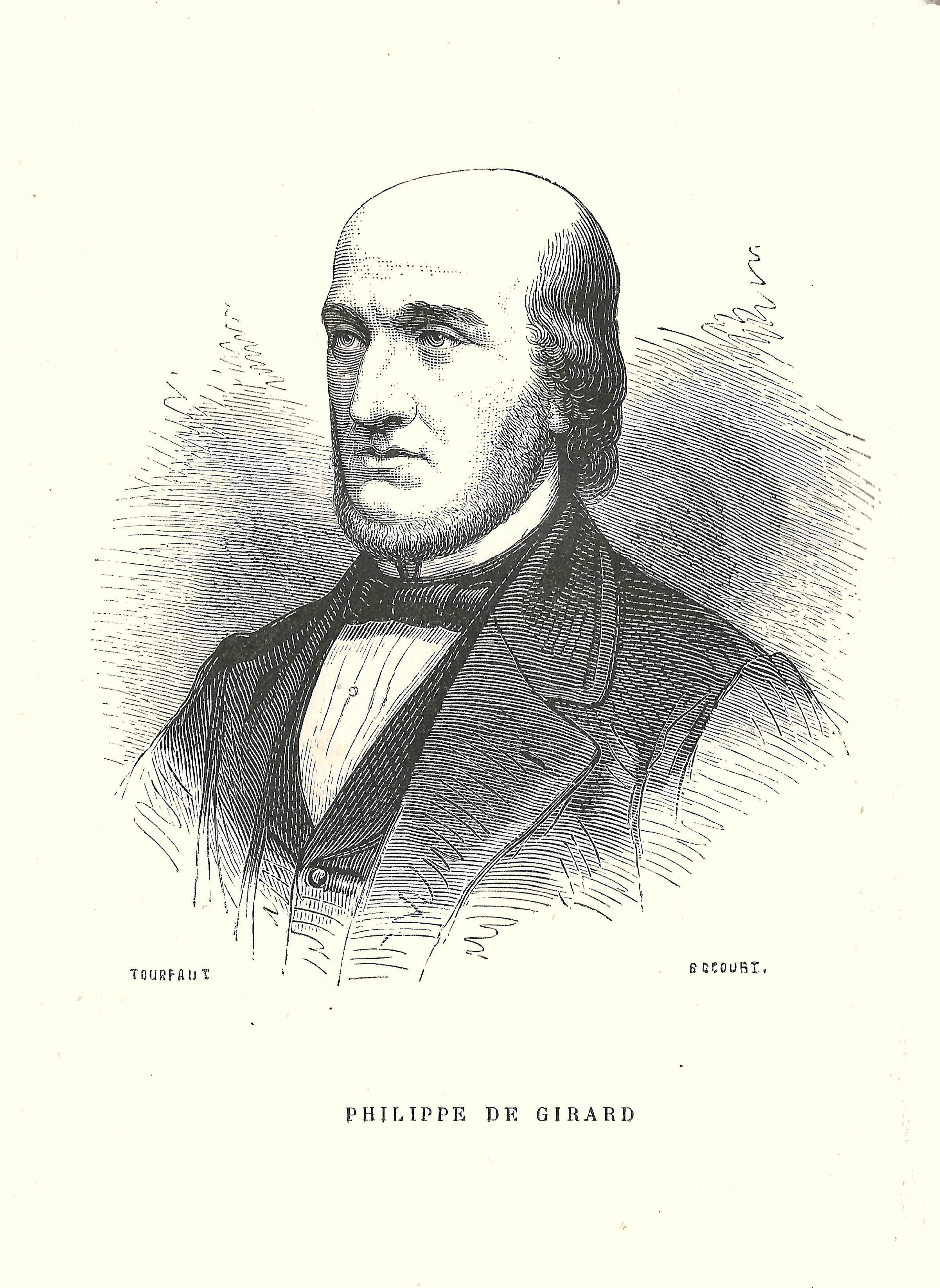 Portrait de Philippe de Girard